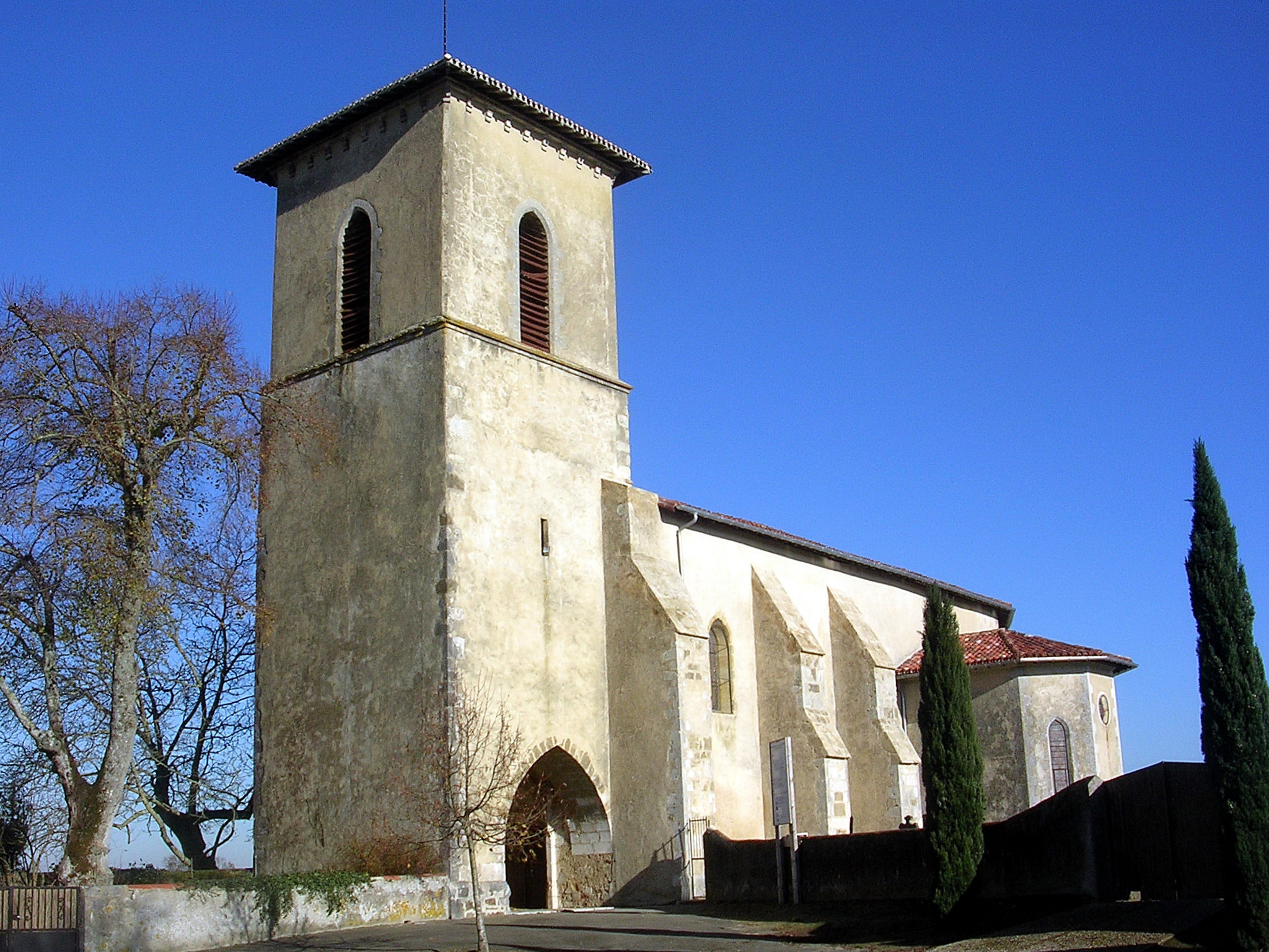 Eglise de Renung (Landes, France)